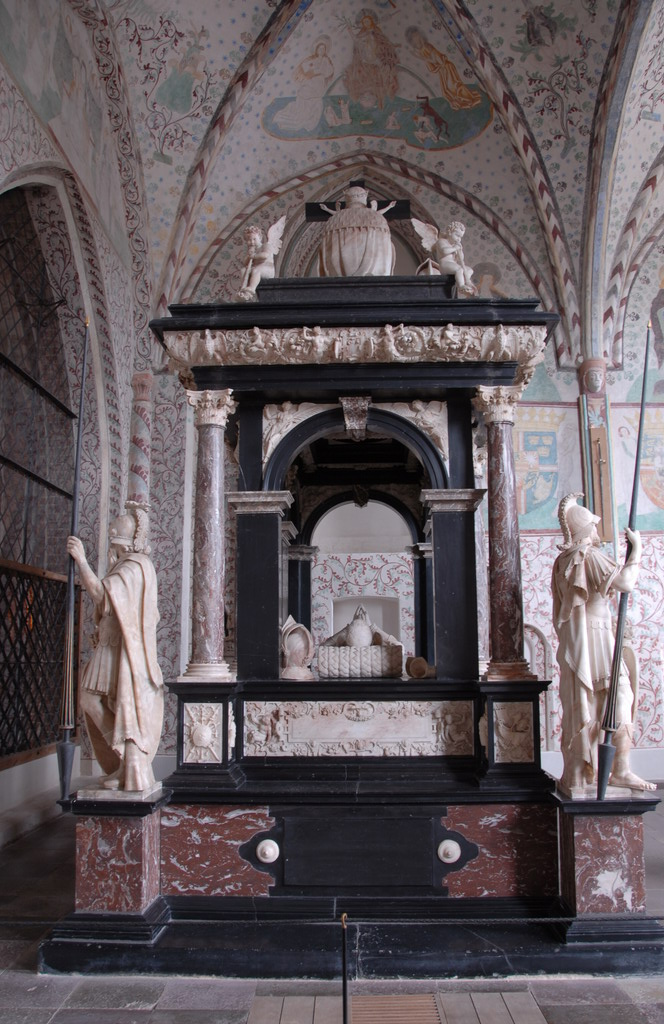 Rond 1460 voltooide kapel van Christian I. Dit gotische pantheon wordt gestut door een granieten zuil waarop 24 vorsten uit diverse landen hun lengte hebben laten aantekenen. De langste was tsaar Peter (208,4 cm), de kleinste Christian VII (164,1 cm). De graven zijn die van Christian III en Frederik II, beiden vergezeld van hun echtgenote Dorothea respectievelijk Sophie. Het renaissancemonument voor Christian en Dorothea, een aediculagraf, is een pronkjuweel van de hand van de Antwerpenaar Cornelius Floris (1576